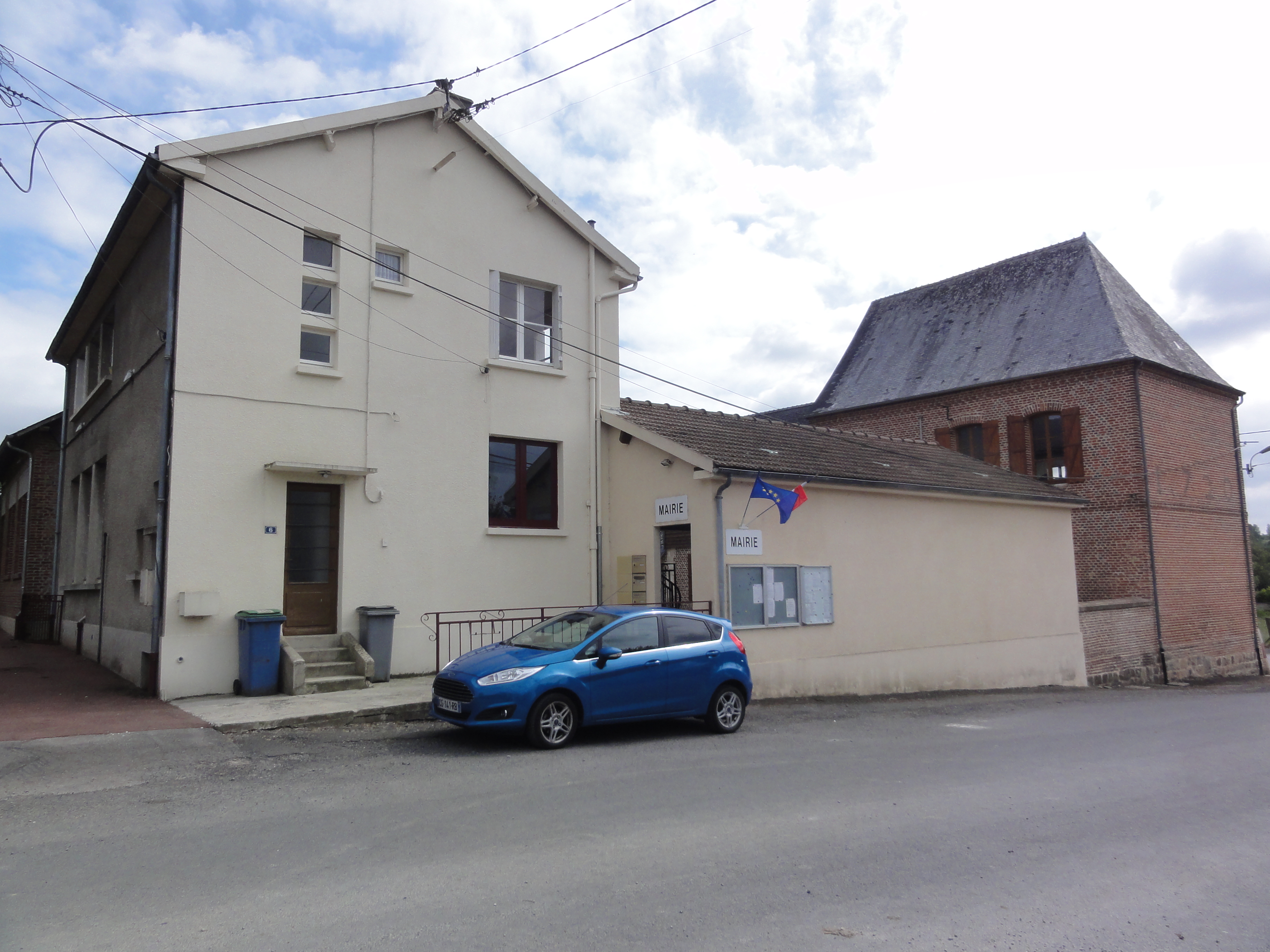 Thenailles (Aisne) mairie